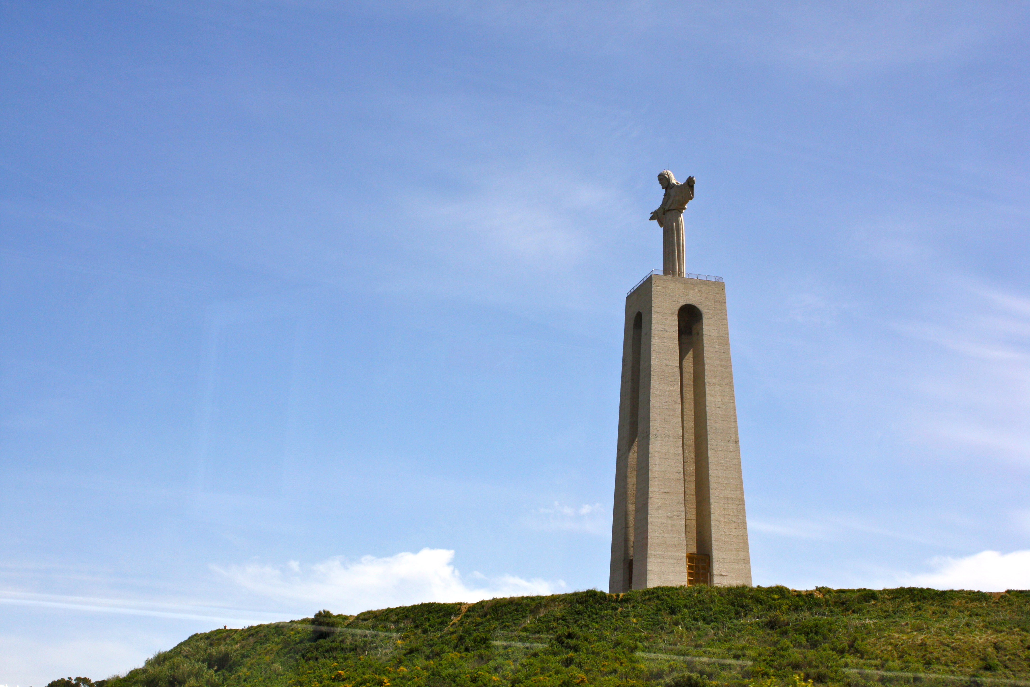 Lisbon One - 071